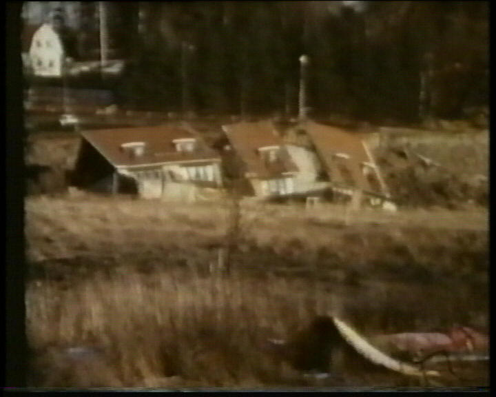 Bild tagen från Tångedal över Tuveraset med super8 kamera